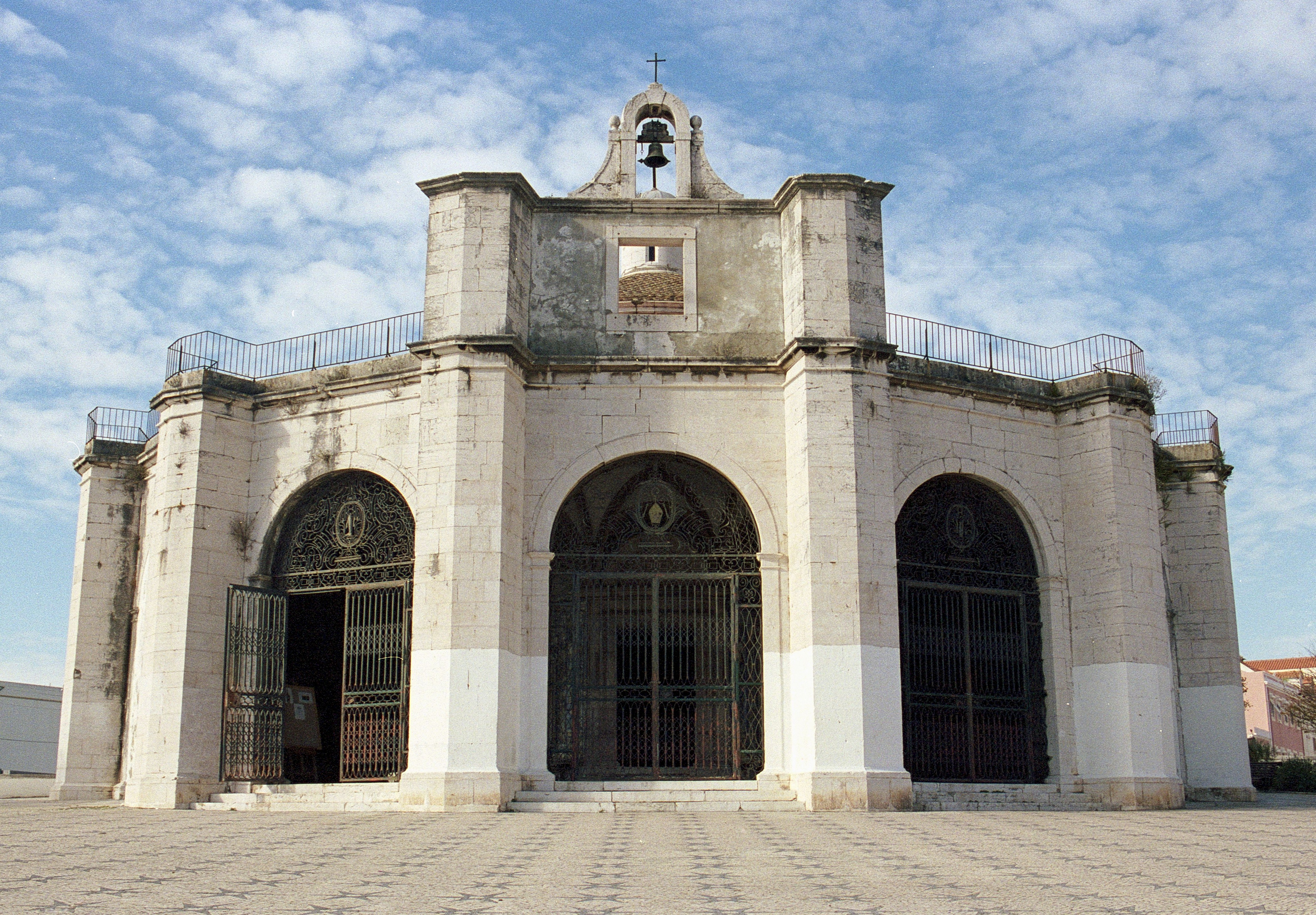 Lisbon